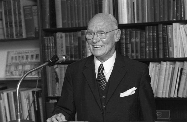 Verleihung der Ehrenmitgliedschaft der Ludwig-Erhard-Stiftung an Bundesminister a.D. Dr. Westrick